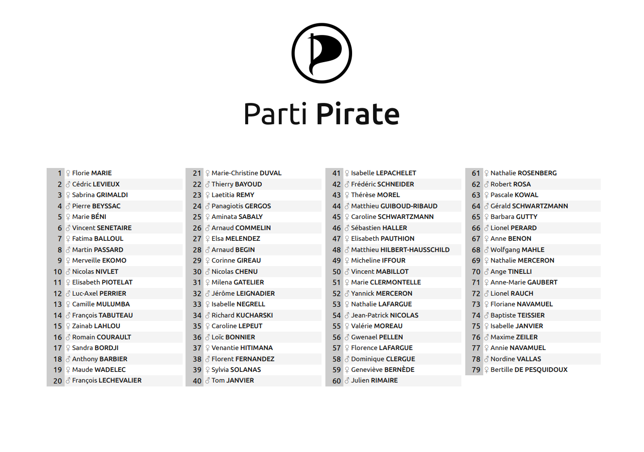 Bulletin de vote du Parti pirate pour les élections européennes de 2019 en France. Le Logo est sous licence Creative Commons Attribution 3.0.